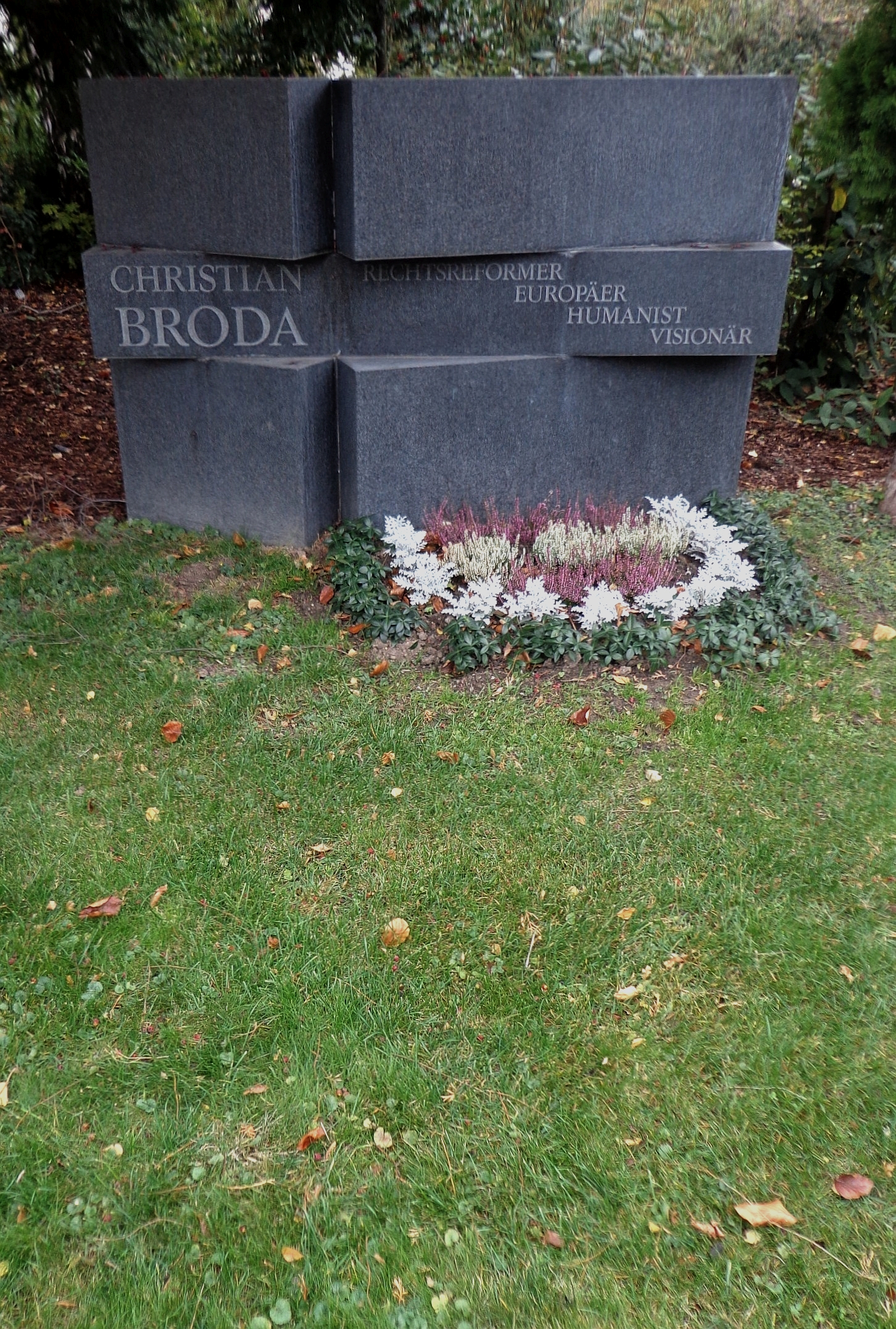 Wiener Zentralfriedhof - Gruppe 32 C, Ehrengrab von Christian Broda